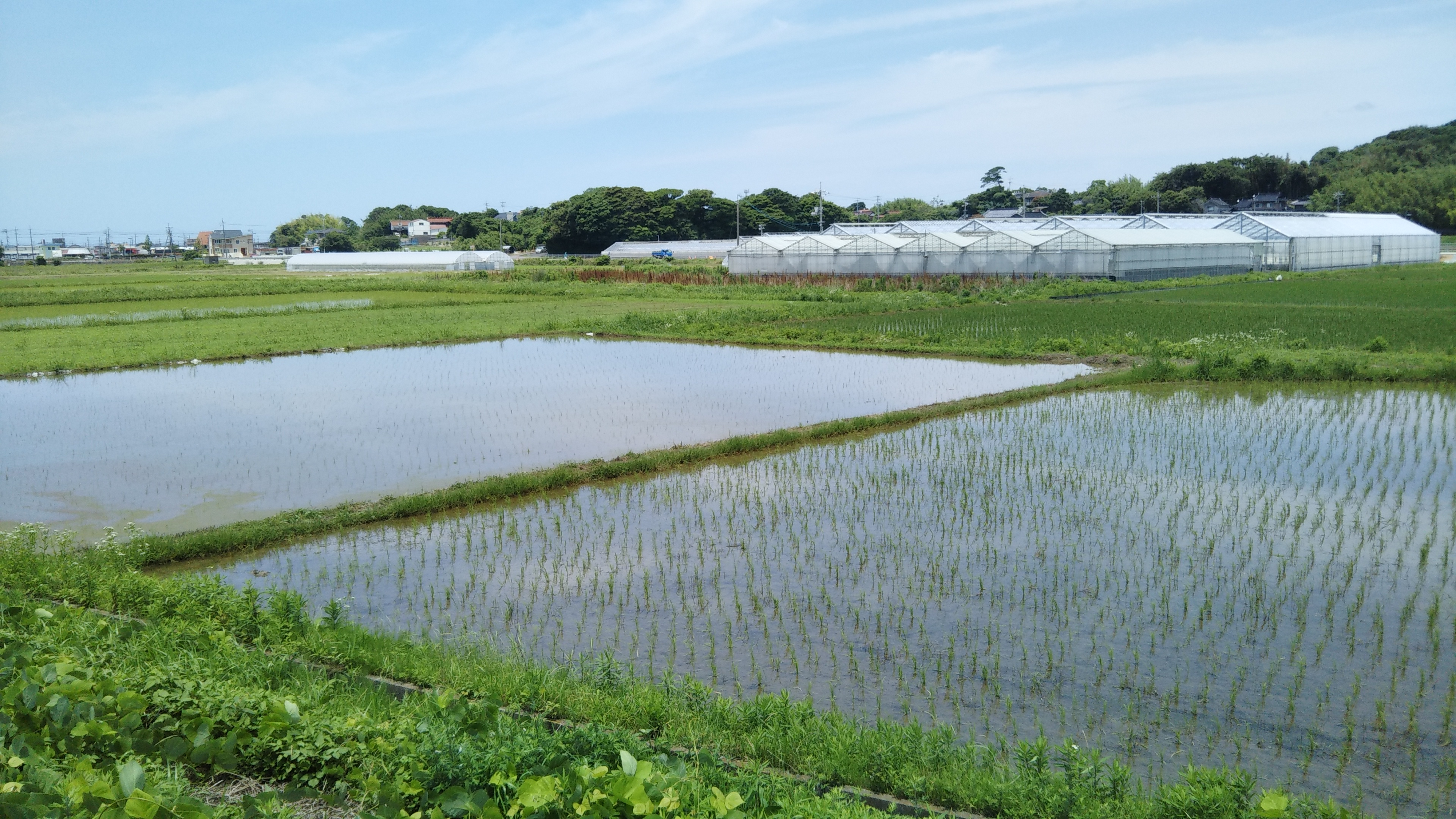 山口県下関市大字綾羅木で撮影した田園地帯。